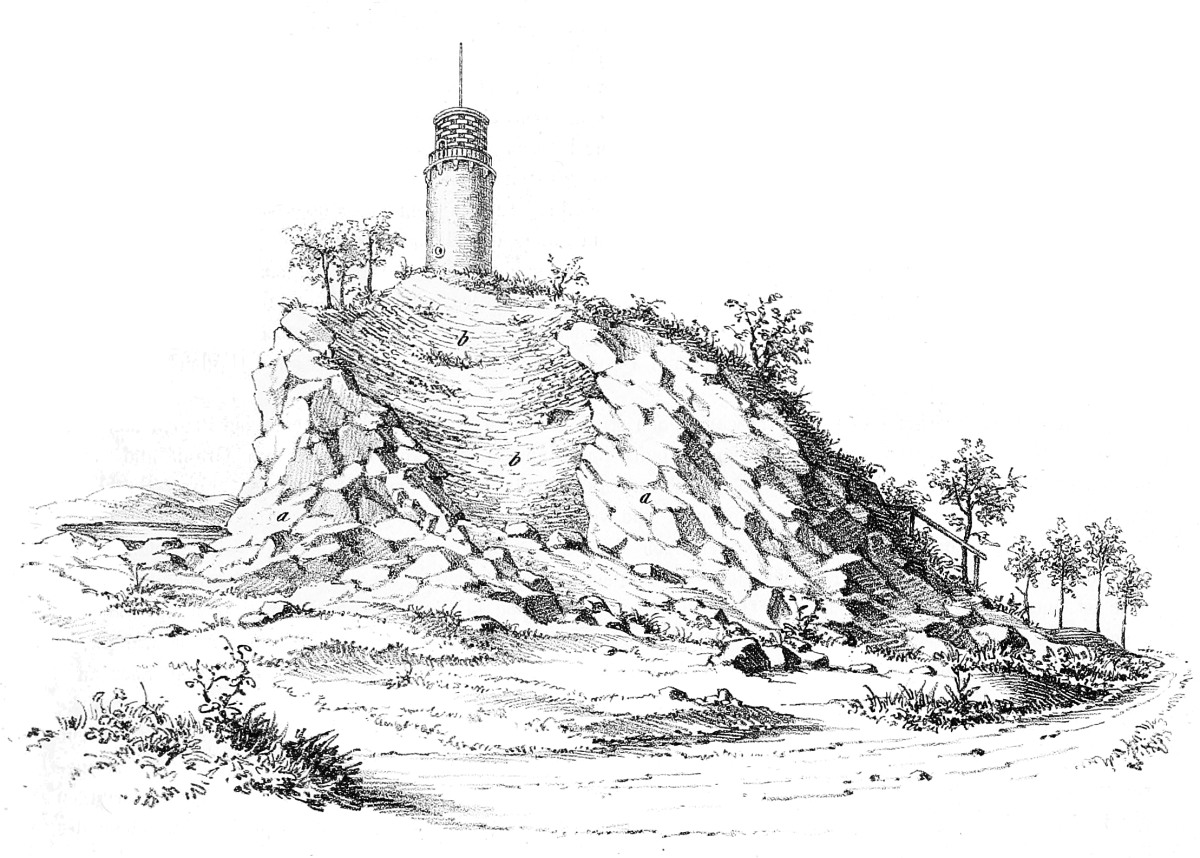 Obercenomane Brandungskessel-Ablagerungen (b) auf variszischem Grundgebirge, dem Monzonit (a)